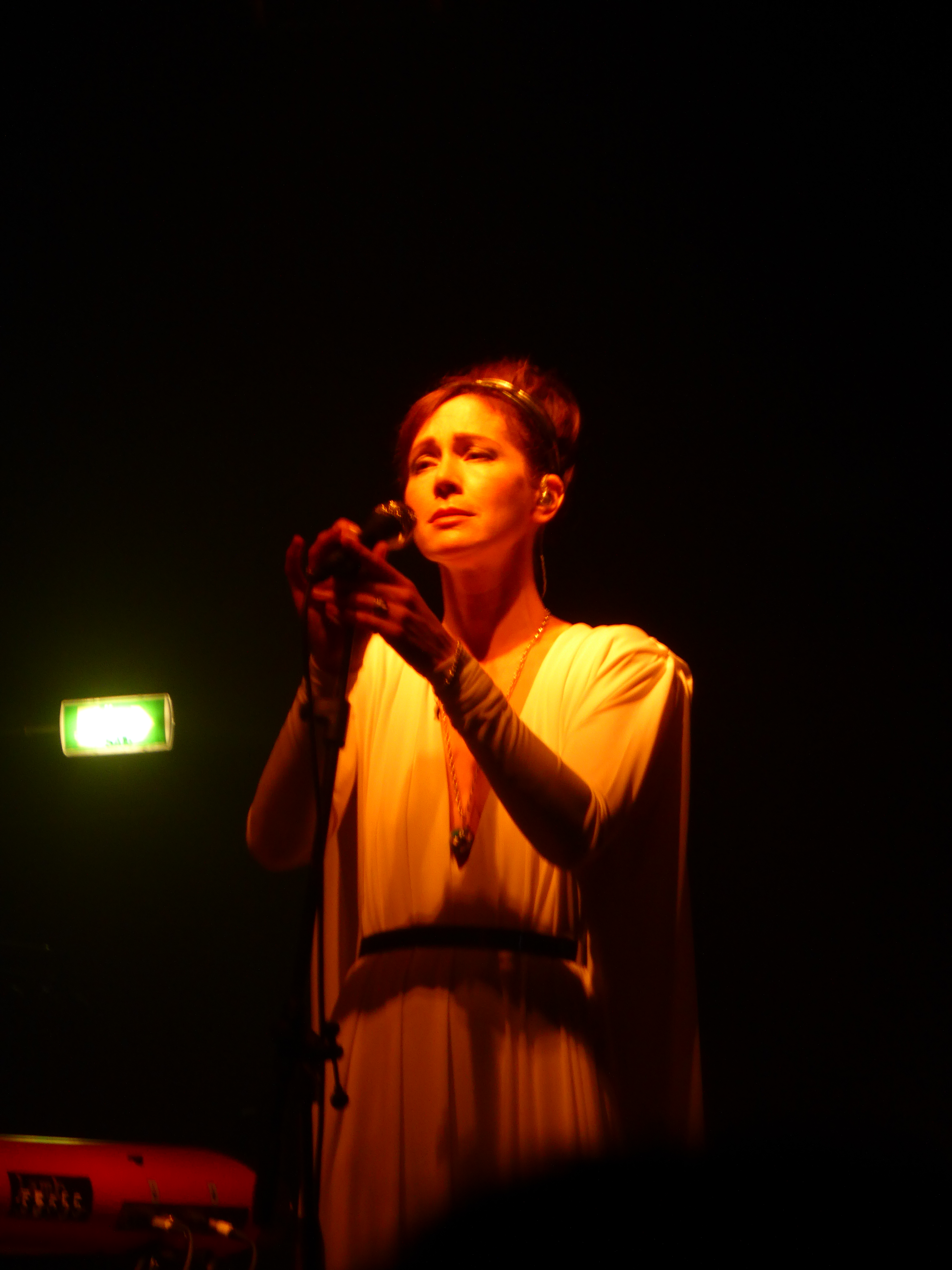 Lamb @ Magazzinigenerali